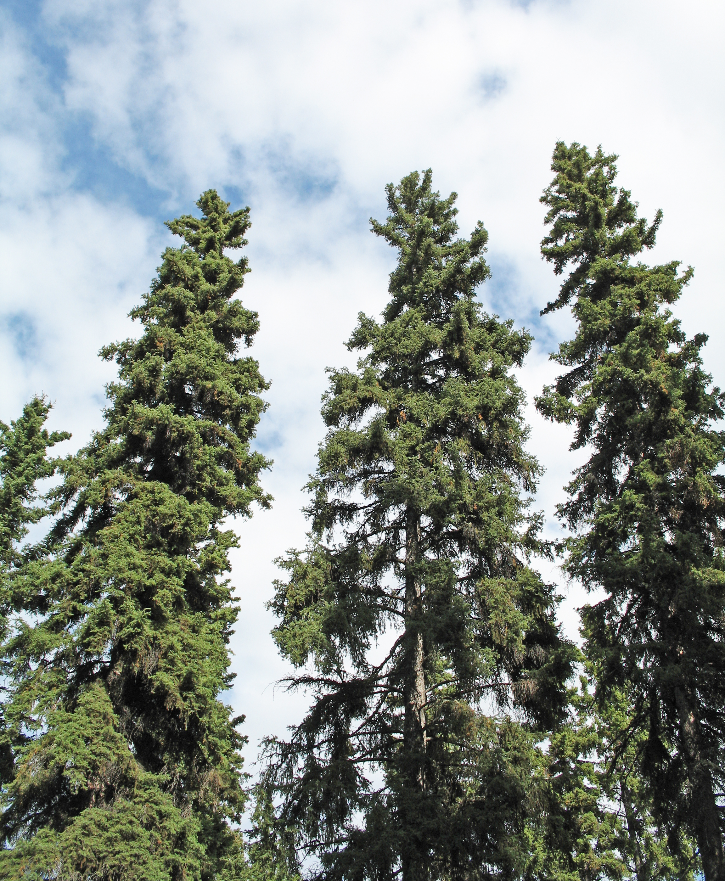 Picea glauca, Fairbanks, Alaska.